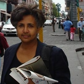 La escritora cubana Caridad Atencio